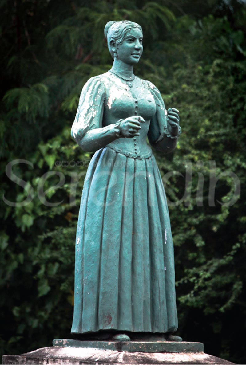 සිංහල: අම්බලන්තොට නෝනගම හංදියේ පිහිටි ගජමන් නෝනාගේ පිළිරුව